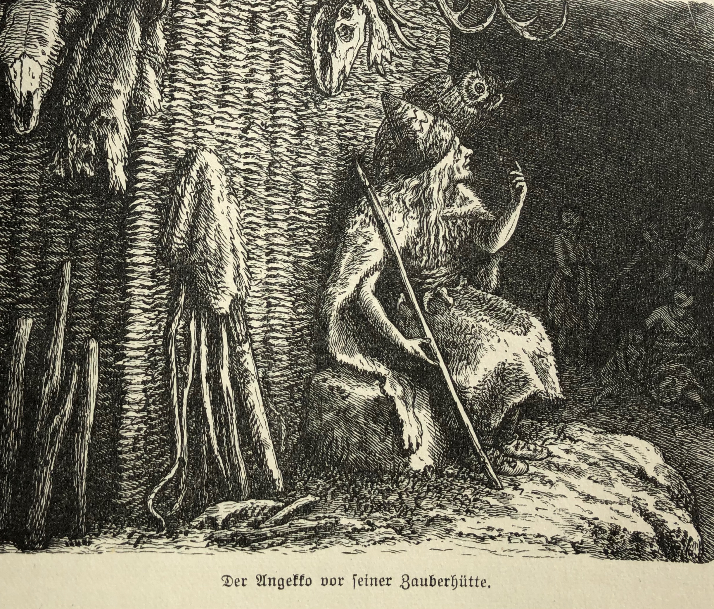 Illustrationen von Heinrich Leutemann aus dem Buch "Rulaman" von David Friedrich Weinland.